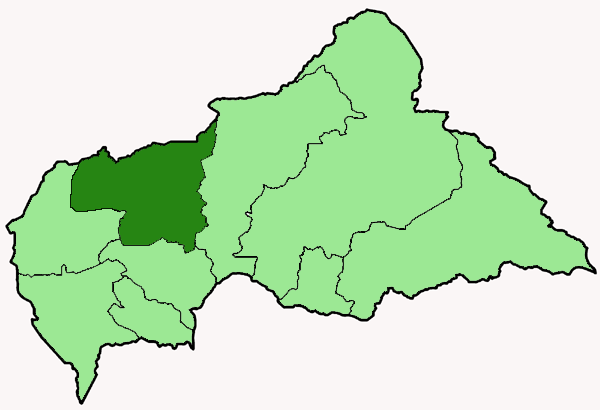 Mappa della diocesi cattolica di Bossangoa, nella Repubblica Centrafricana. Anno 2009.